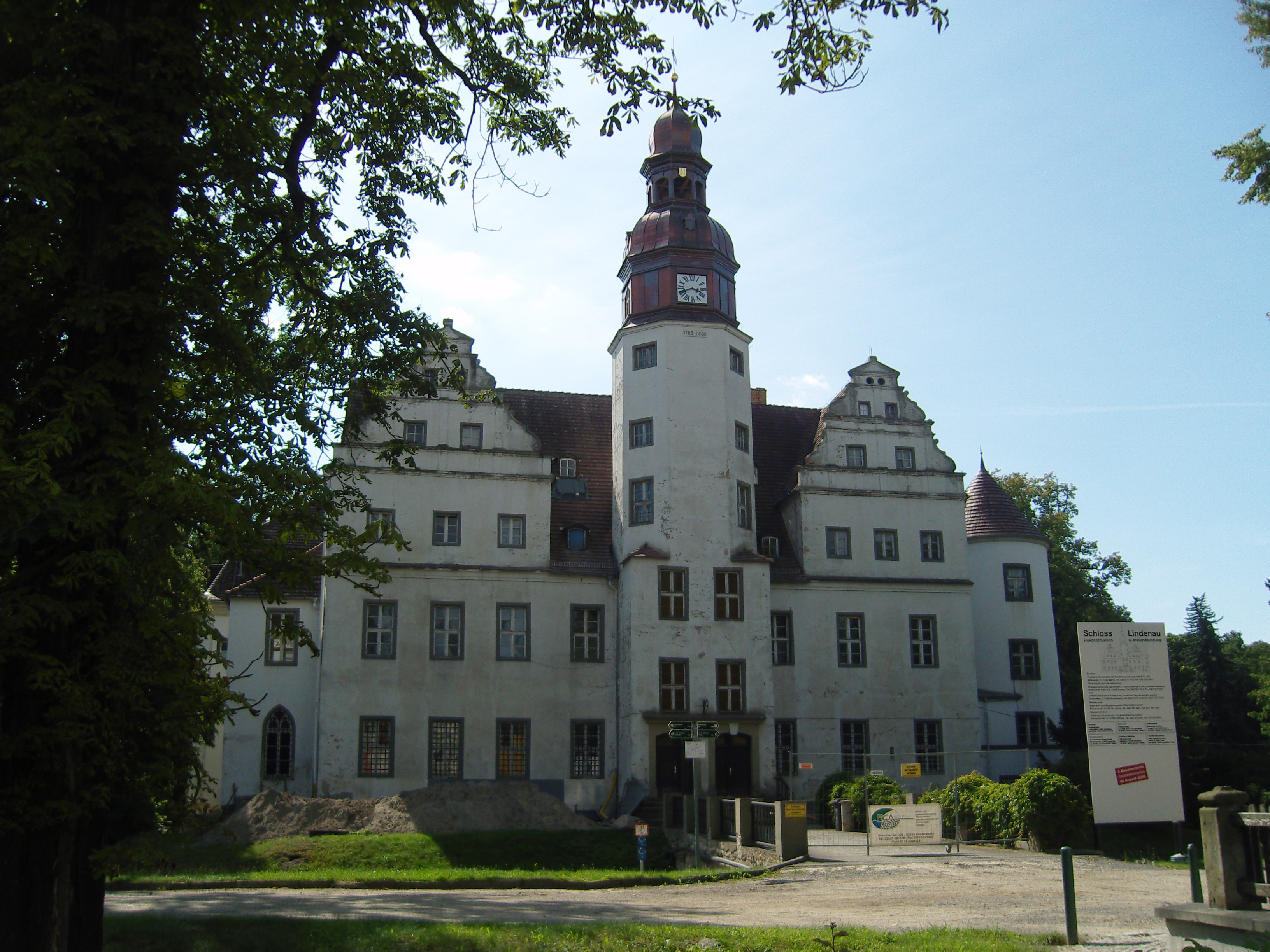 Schloss Lindenau; Baudenkmal